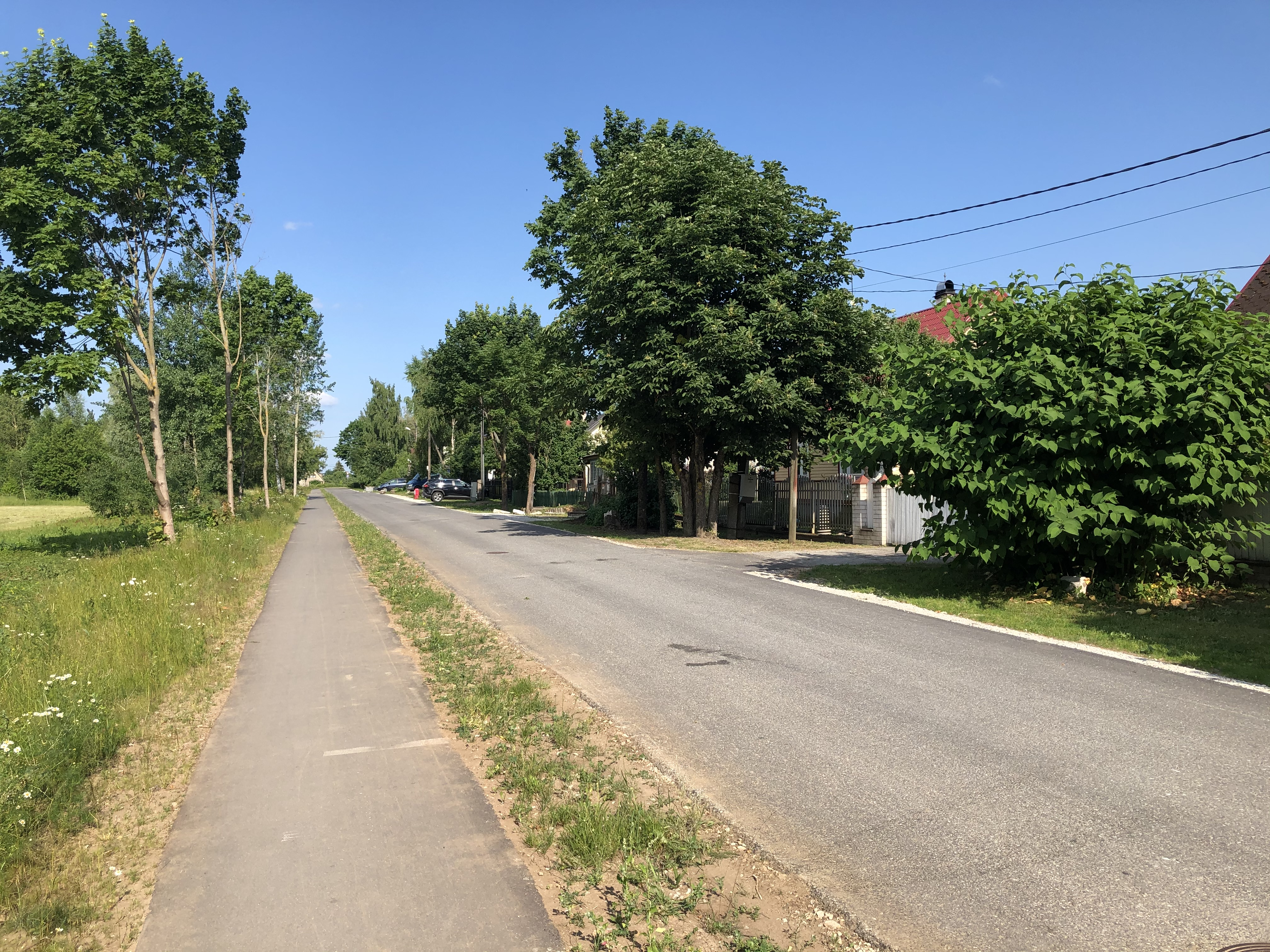 A.Juhhanovi tänav, Narva